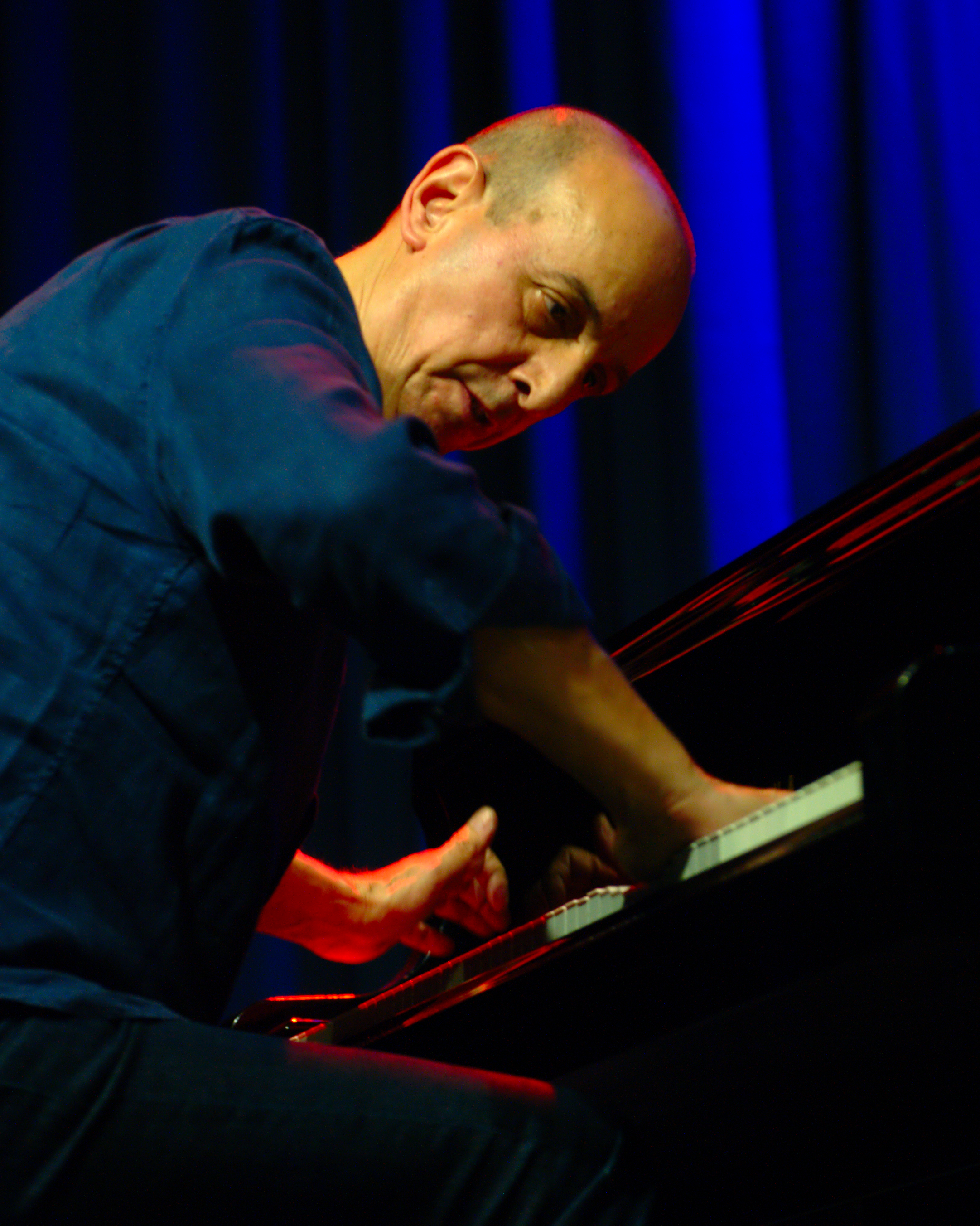 Agustí Fernández auf dem Konzert mit Lucía Martínez beim just music ‘17 - Beyond Jazz Festival Wiesbaden am 18.02.2017